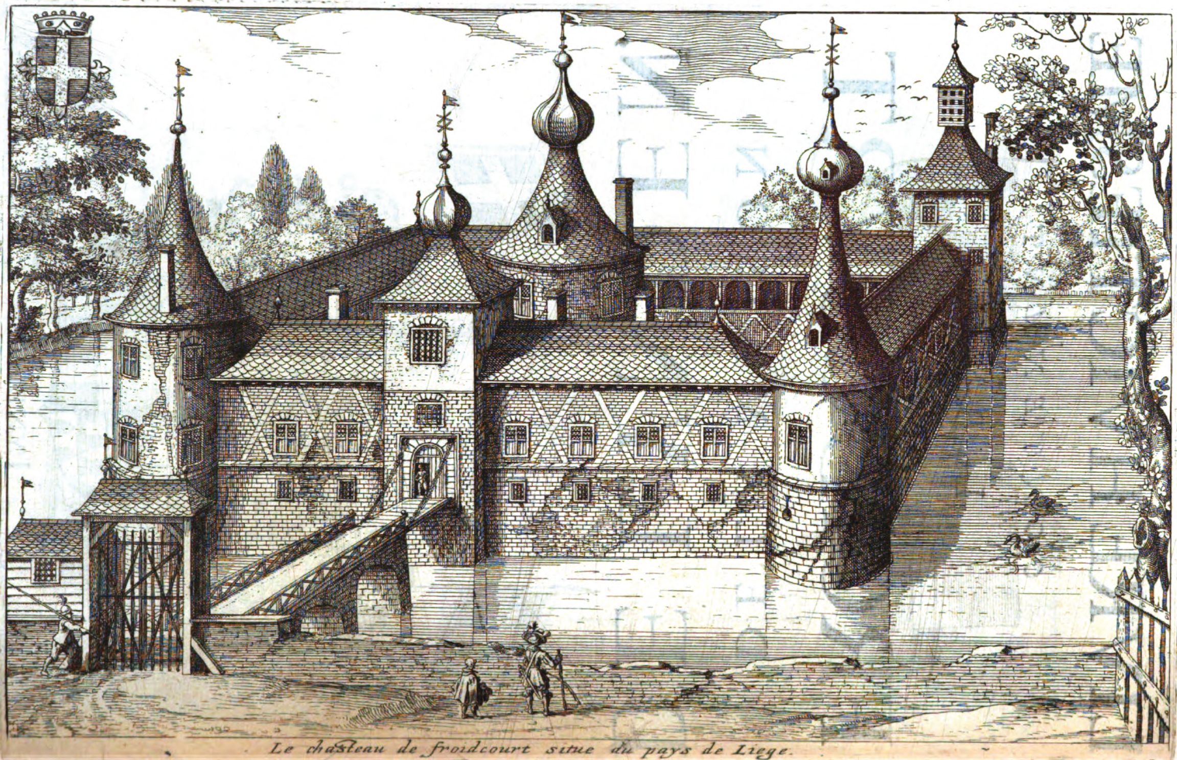 Chateau de Froidcourt. Annales généalogiques de la Maison de Lynden. Christophe Butkens. Anvers, 1626.